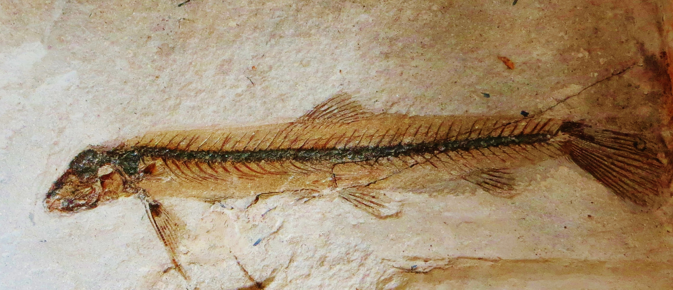 Fossil of Cobitis, an extinct fish - Took the picture at Teylers Museum, Haarlem